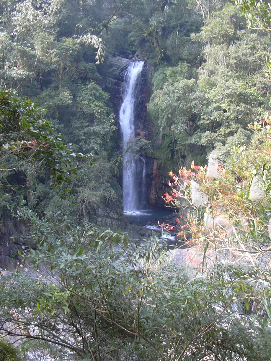 於內洞國家森林遊樂區觀瀑步道上眺望位於南勢溪對岸的烏紗溪瀑布。